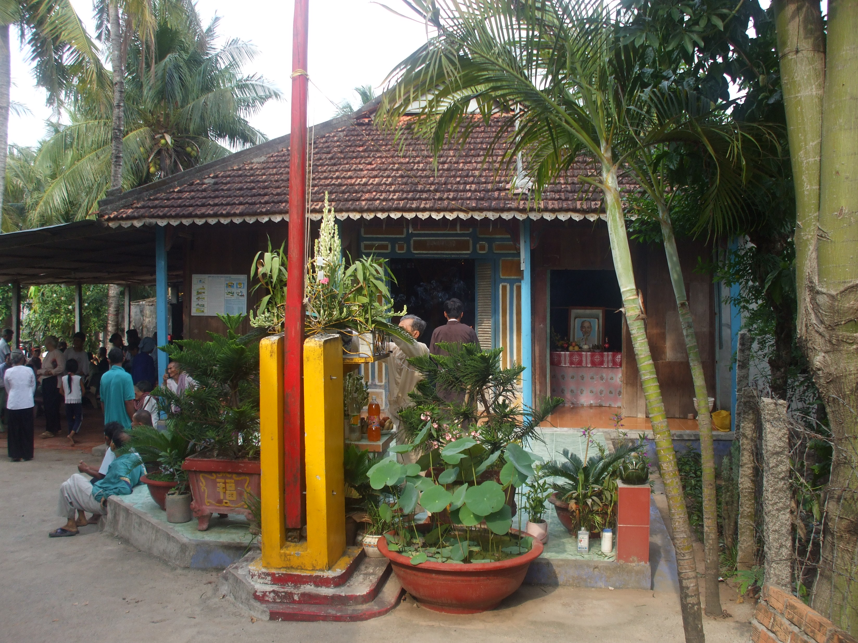 Nhà Phật Trùm sinh sống khi xưa (ấp Sàlon, Tri Tôn, An Giang, Việt Nam), nay trở thành nơi thờ cúng ông.